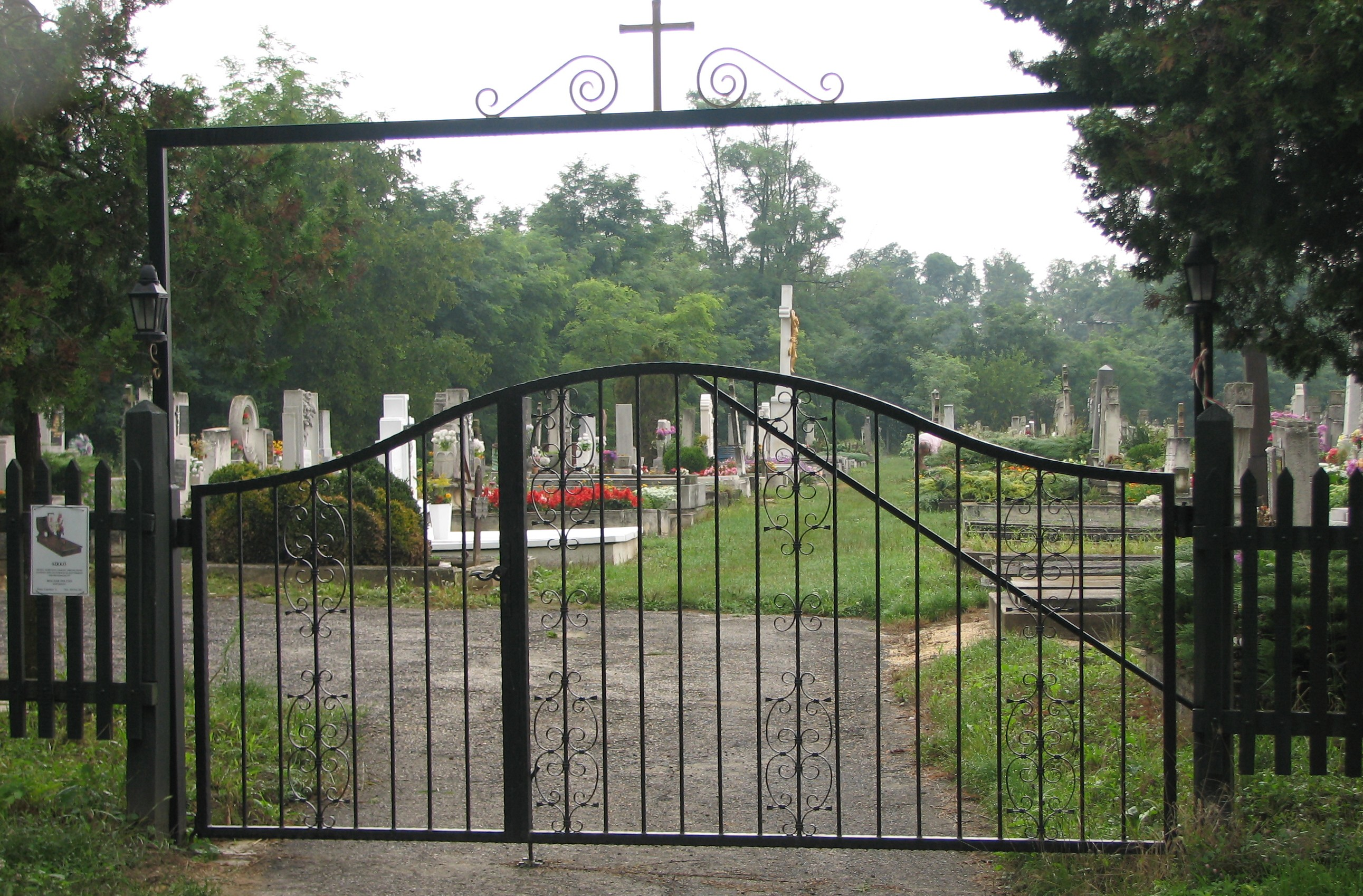 A kisszőlősi temető